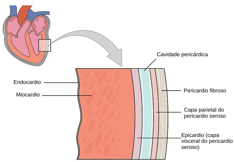 Capas da parede do corazón e do pericardio